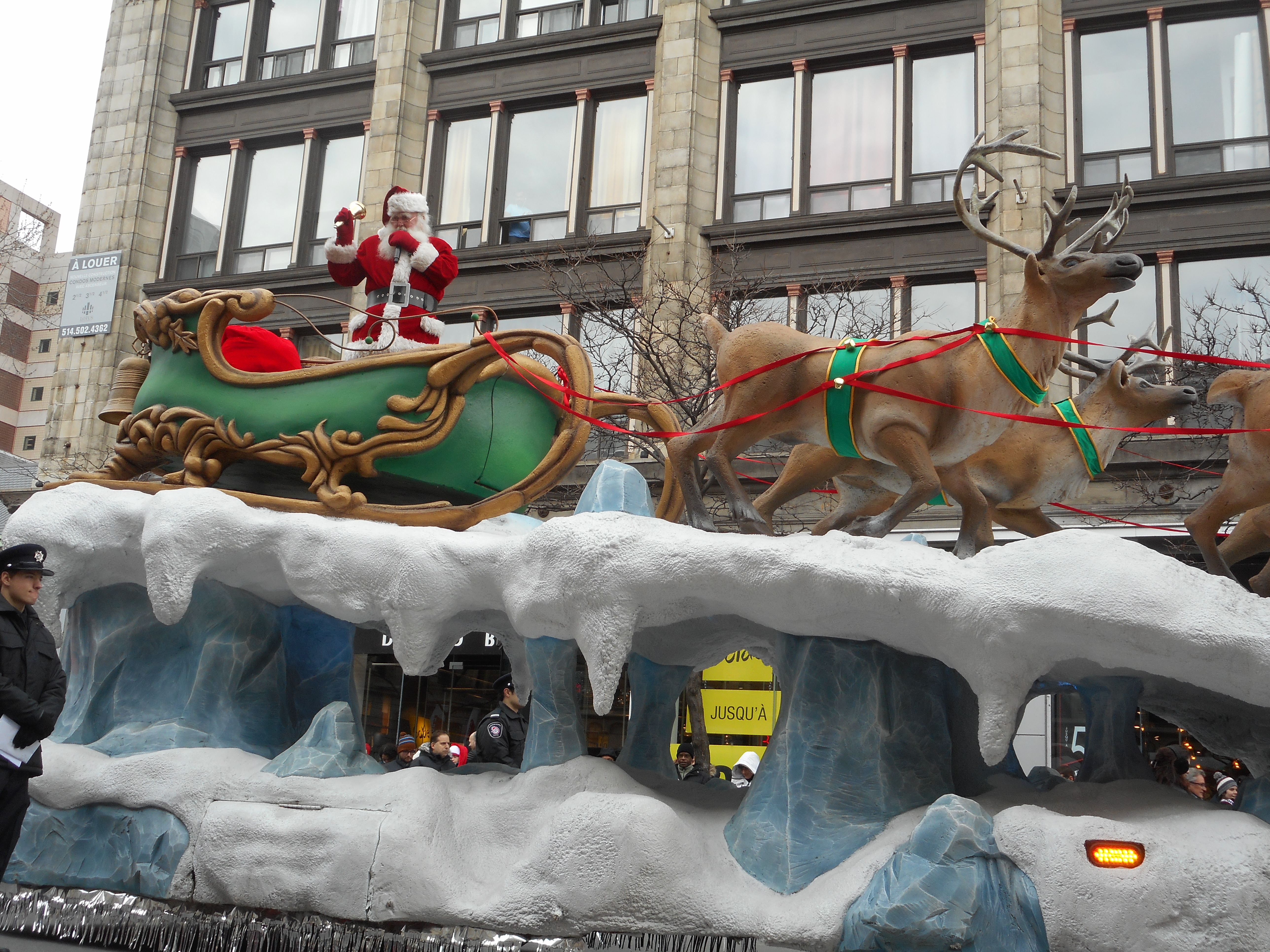 Défilé du Père Noël, rue Sainte-Catherine Ouest, Montréal